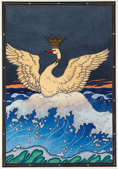 Зворыкин Борис Васильевич (1872 - 1942) «Царевна Лебедь». Иллюстрация к сказке А.С. Пушкина «Сказка о царе Салтане». 1920-е. Бумага, тушь, перо, акварель, белила, серебряная и бронзовая краска, 29,6 х 22,8 см. В левом нижнем углу, на изображении, авторские инициалы: «Б.З.». «Сказка о царе Салтане» с иллюстрациями Б.В. Зворыкина была издана в Париже в 1925 году. Данная иллюстрация в издание не вошла.